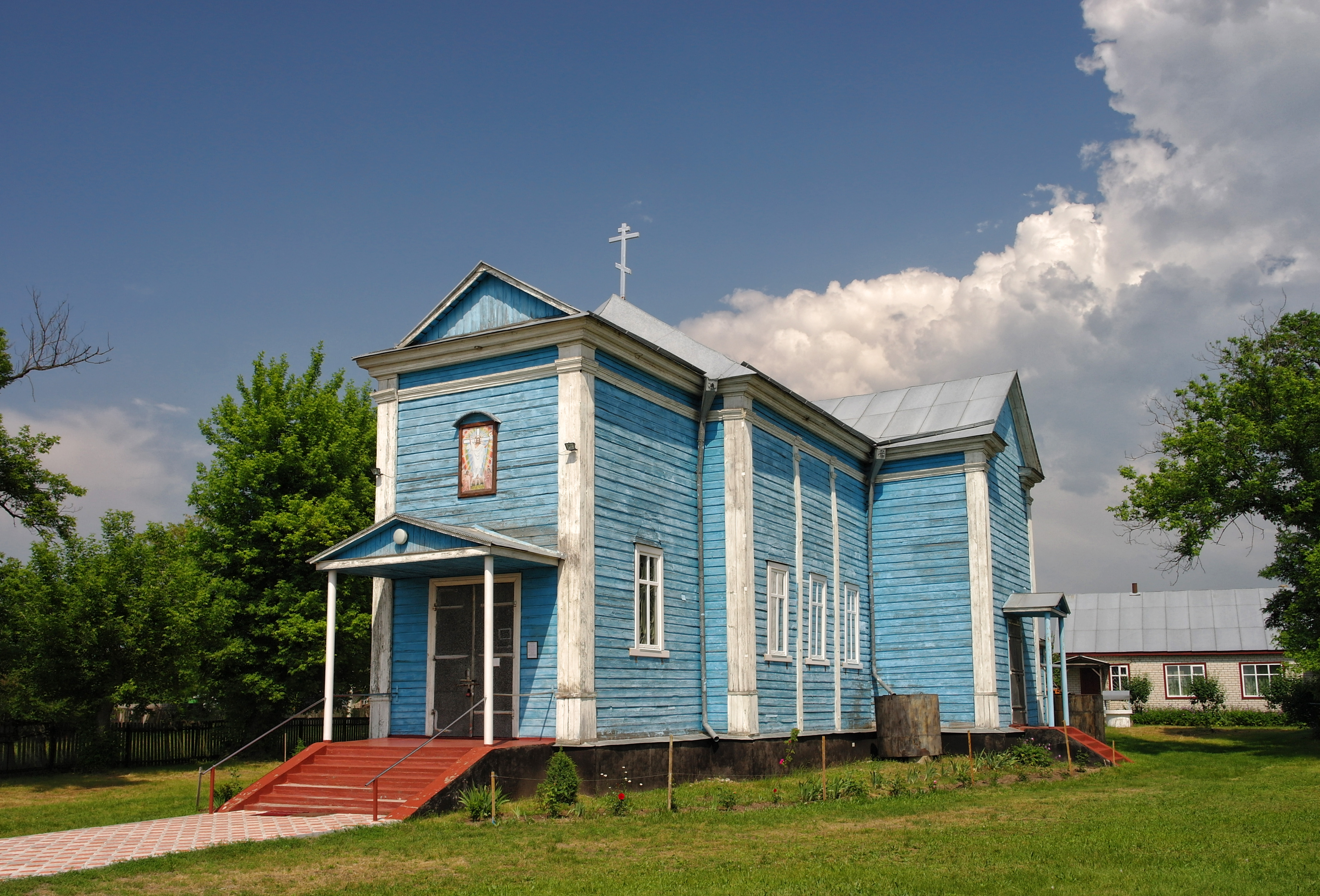 с. Костянтинівка, Церква Воскресіння